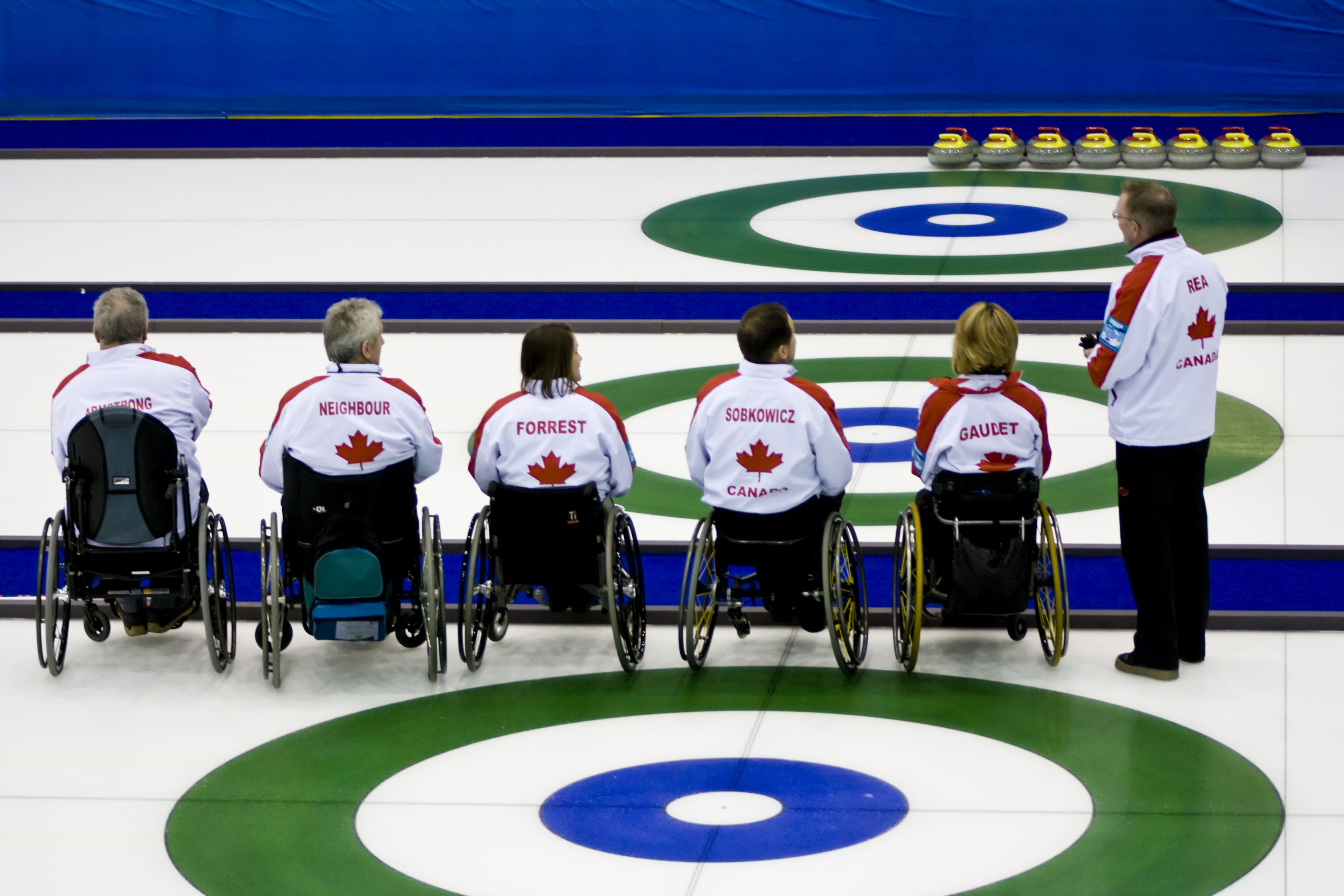 Team Canada